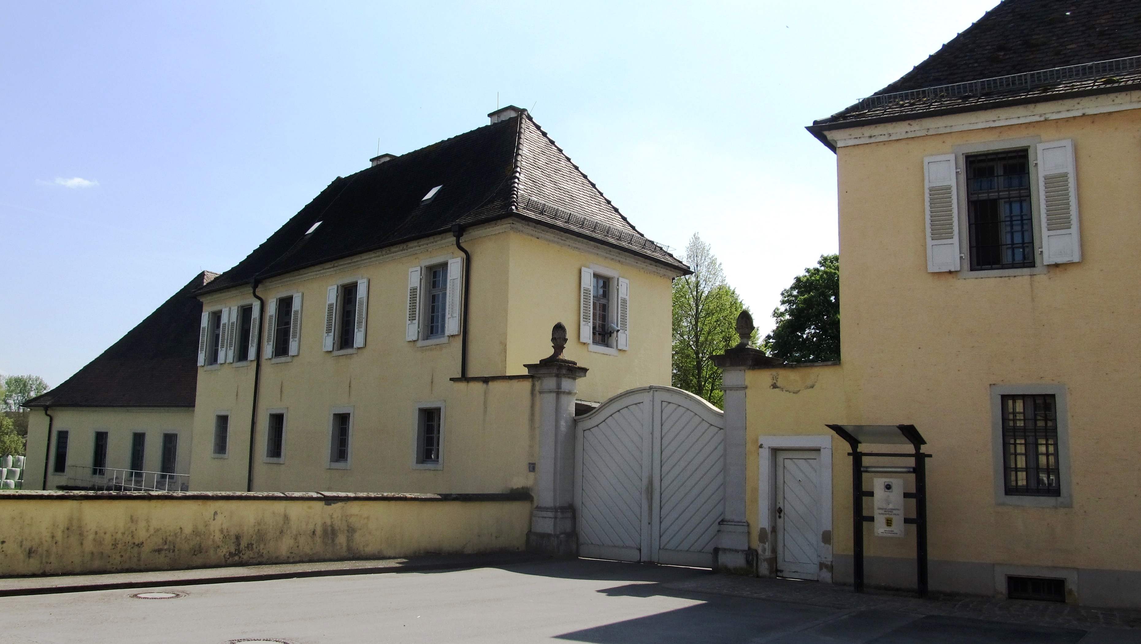 Schloss Kislau, die Ursprünge der Anlage reichen in das 11. Jahrhundert zurück.